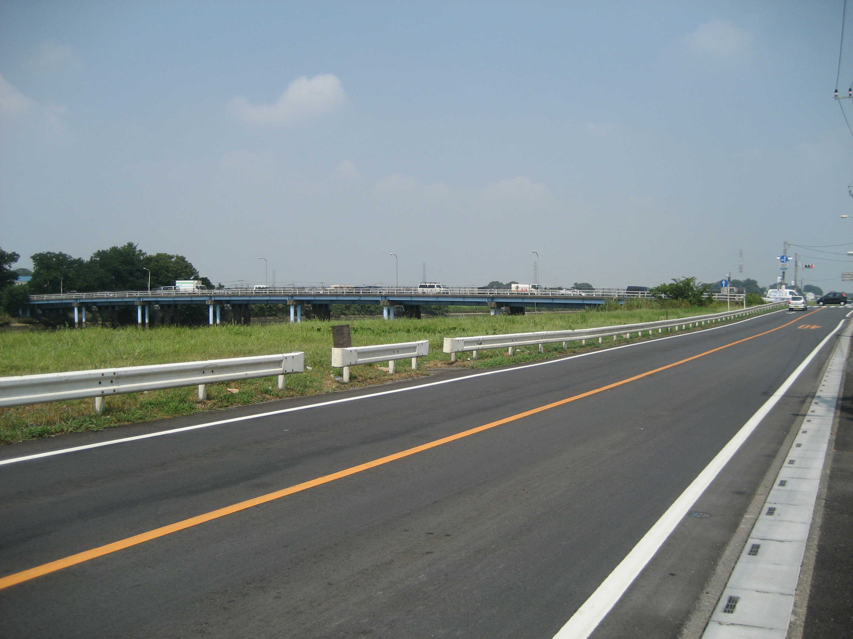 中川と八条橋・県道67号線29号線